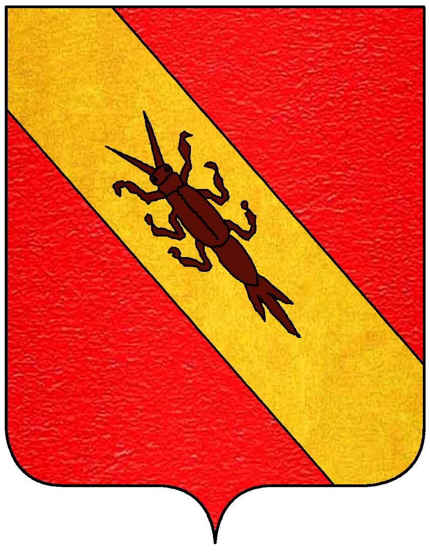 Stemma della famiglia Grillo